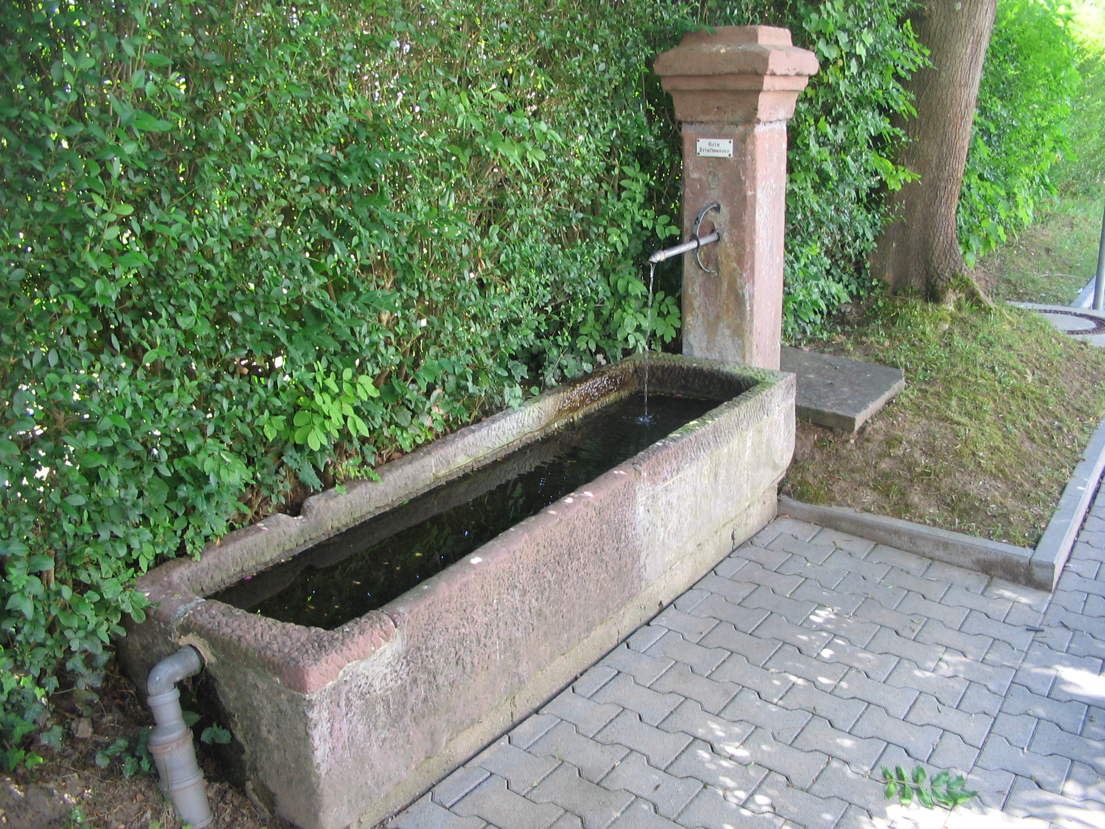 Denkmalgeschützter Dorfbrunnen in der Mühlstraße in Stockheim (Michelstadt)